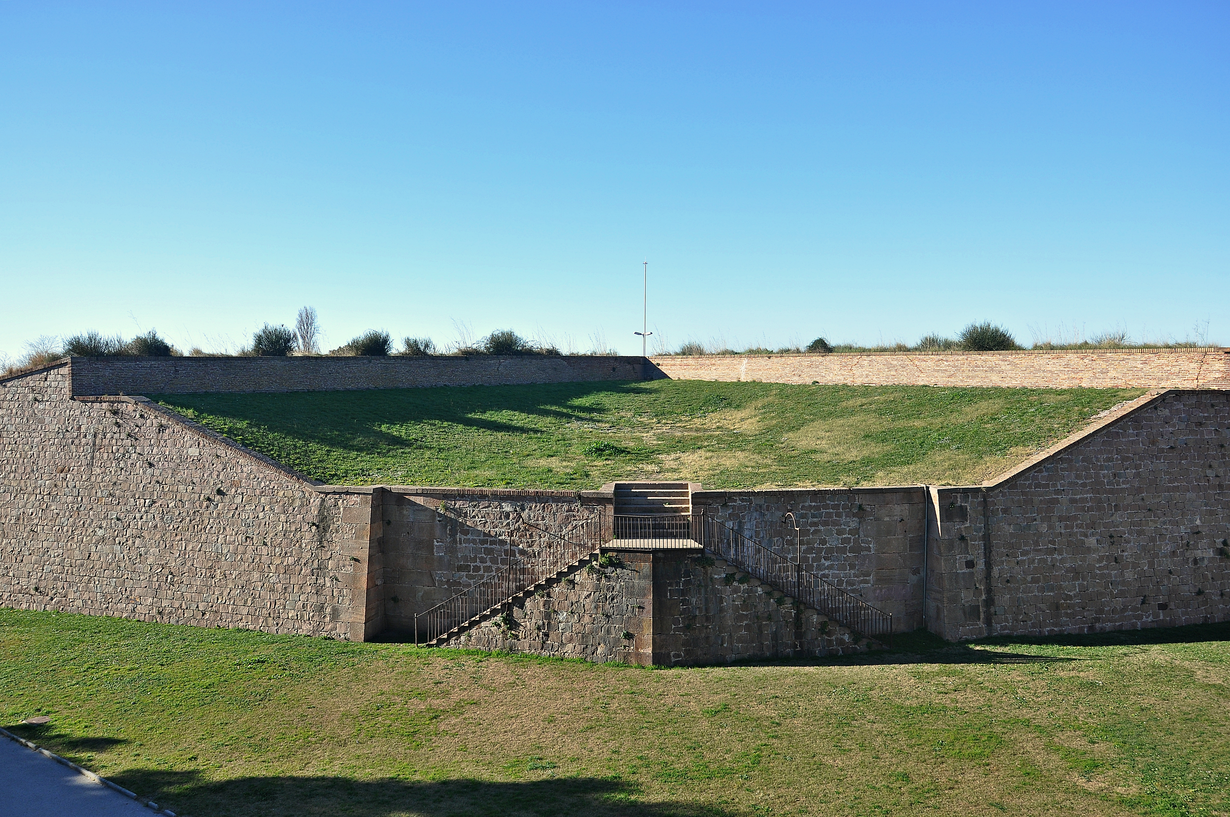 cataluña